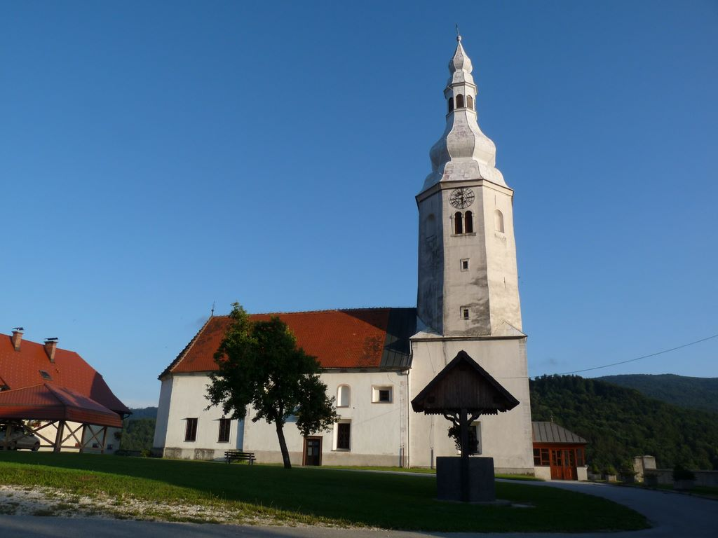 Sv. Vid v Šentvidu pri Planini